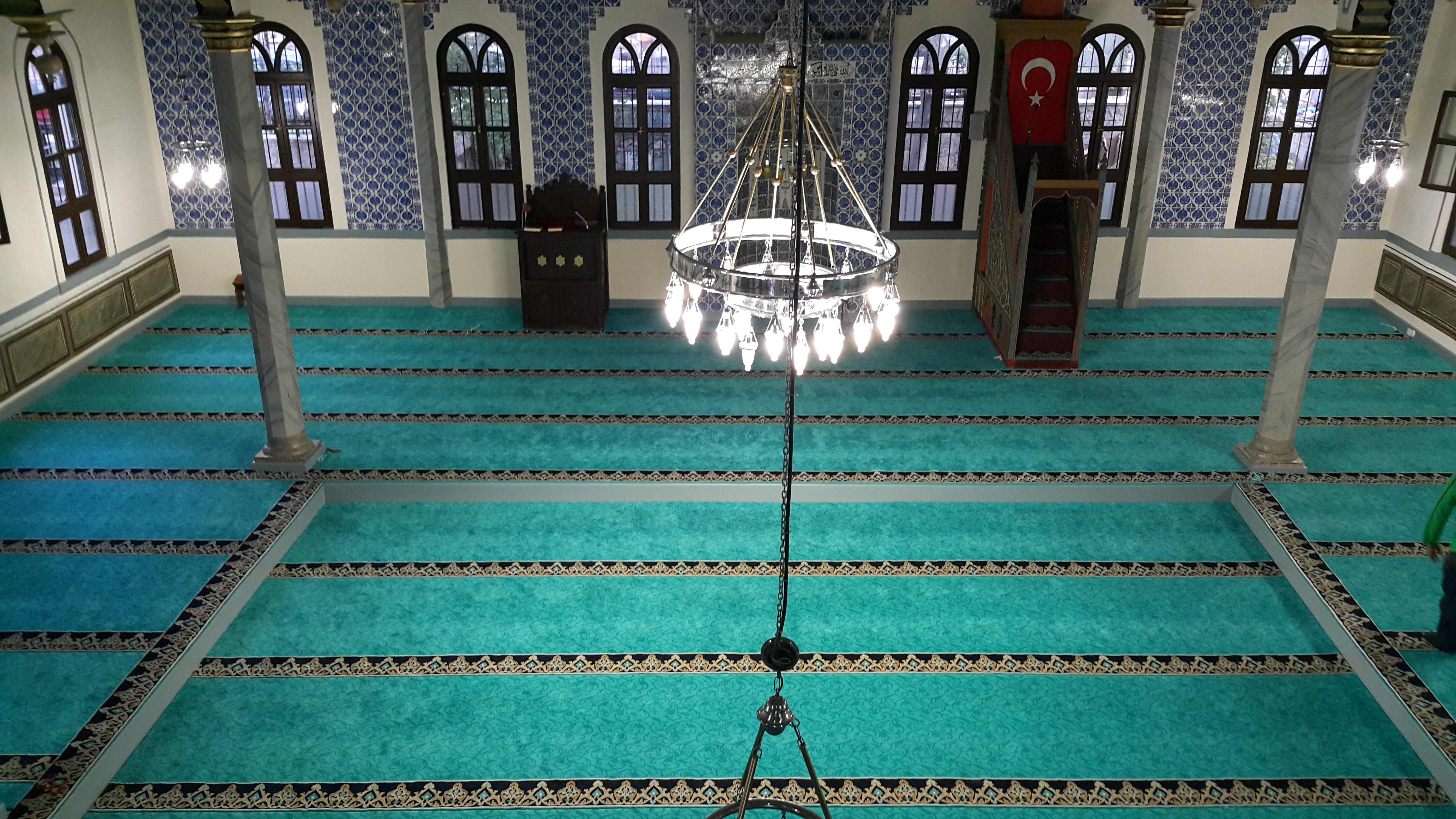 Restorasyon Sonrası Ali Paşa Camii İç Kısmı-3